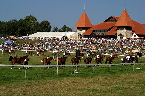 Vorführung der Zuchthengste am Marché-Concours in Saignelégier 2004